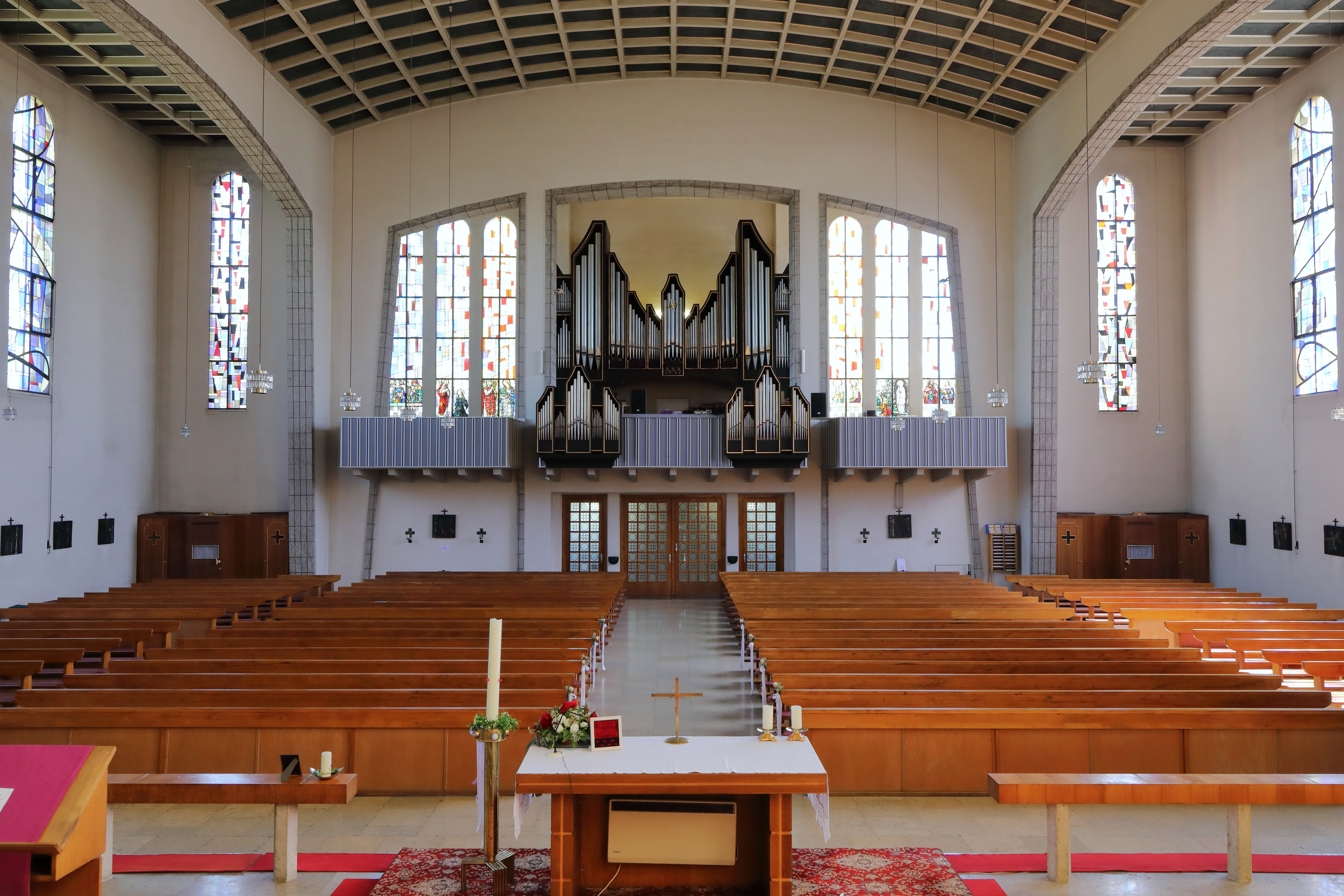 Innenansicht in Richtung Orgelempore der Pfarrkirche St. Stephan in Stephanshart, ein Ortsteil der niederösterreichischen Marktgemeinde Ardagger.Die Kirche wurde von 1956 bis 1959 nach Plänen von Franz Barnath und Josef Gruber errichtet. Die Orgel mit 4 Manuale, 40 Register sowie mehr als 3100 Pfeifen war ursprünglich die Hauptorgel des Stiftes Wilten, wurde 1964 von Gregor Hradetzky gefertigt und 2007 hierher übertragen.